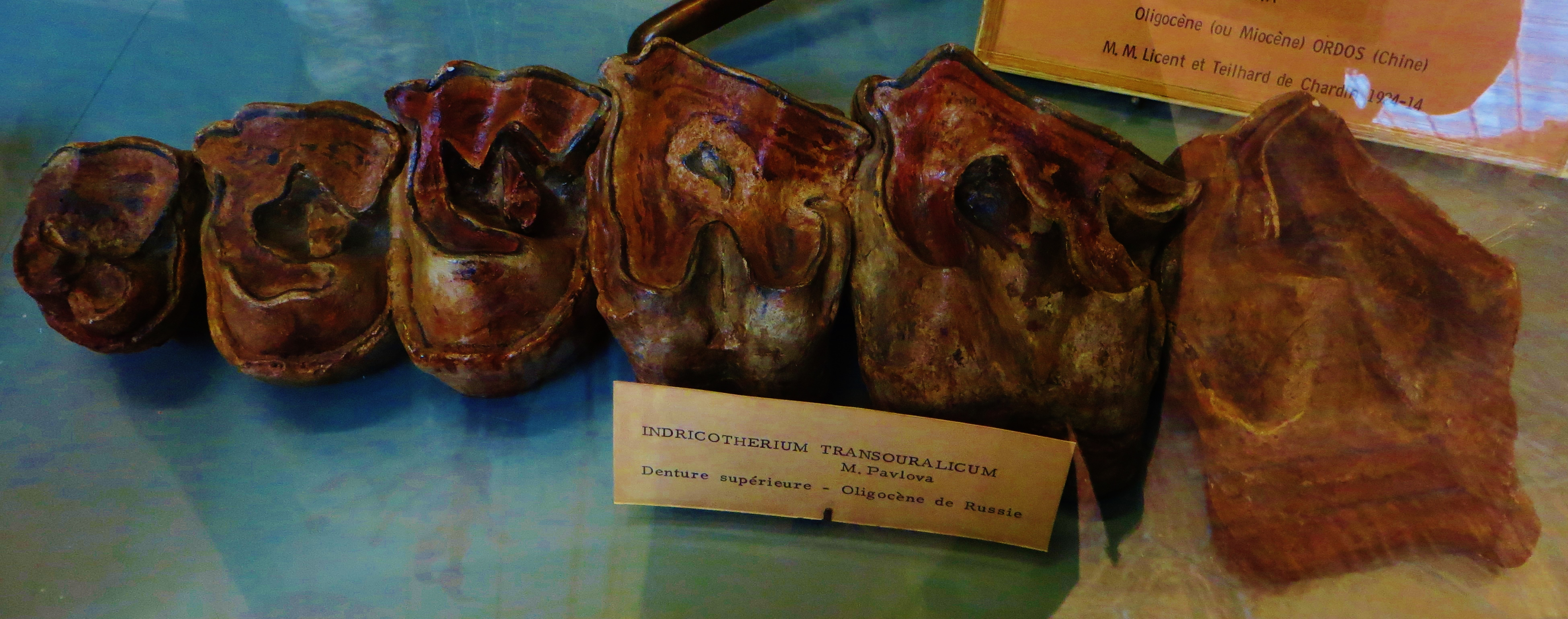 Upper molars of Paraceratherium, an extinct mammal - Took the photo at Musee d'Histoire Naturelle, Paris